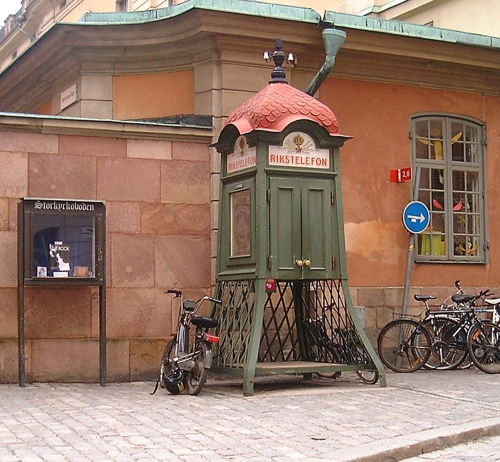 Telephone box at Trångsund, Gamla stan, Stockholm. Perspective fixed digitally.